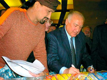 В. Черномырдин (1938-2010) участвует в перфомансе И. Шейх-Задэ «Стена», 9.12.2001. Фото И.Сида.